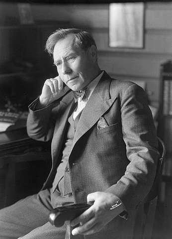 Norwegian novelist and dramatist Olav Duun.